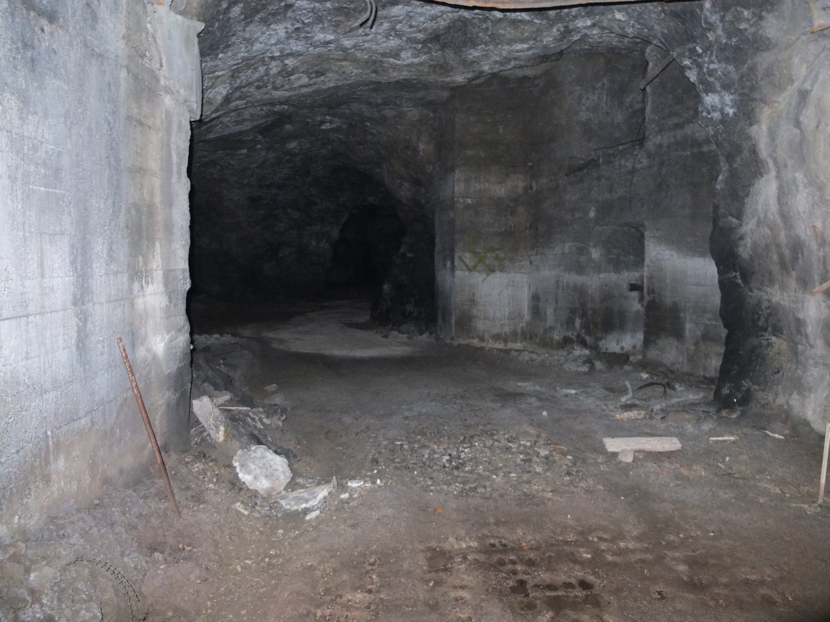 Blick durch das Gitter am Schacht Brasse bei Obrigheim, unterirdische Rüstungsanlage 1944-45, Teil des Außenlager Neckarelz des KZ Natzweiler.